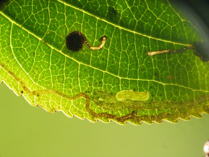 Mine und Raupe von Stigmella catharticella